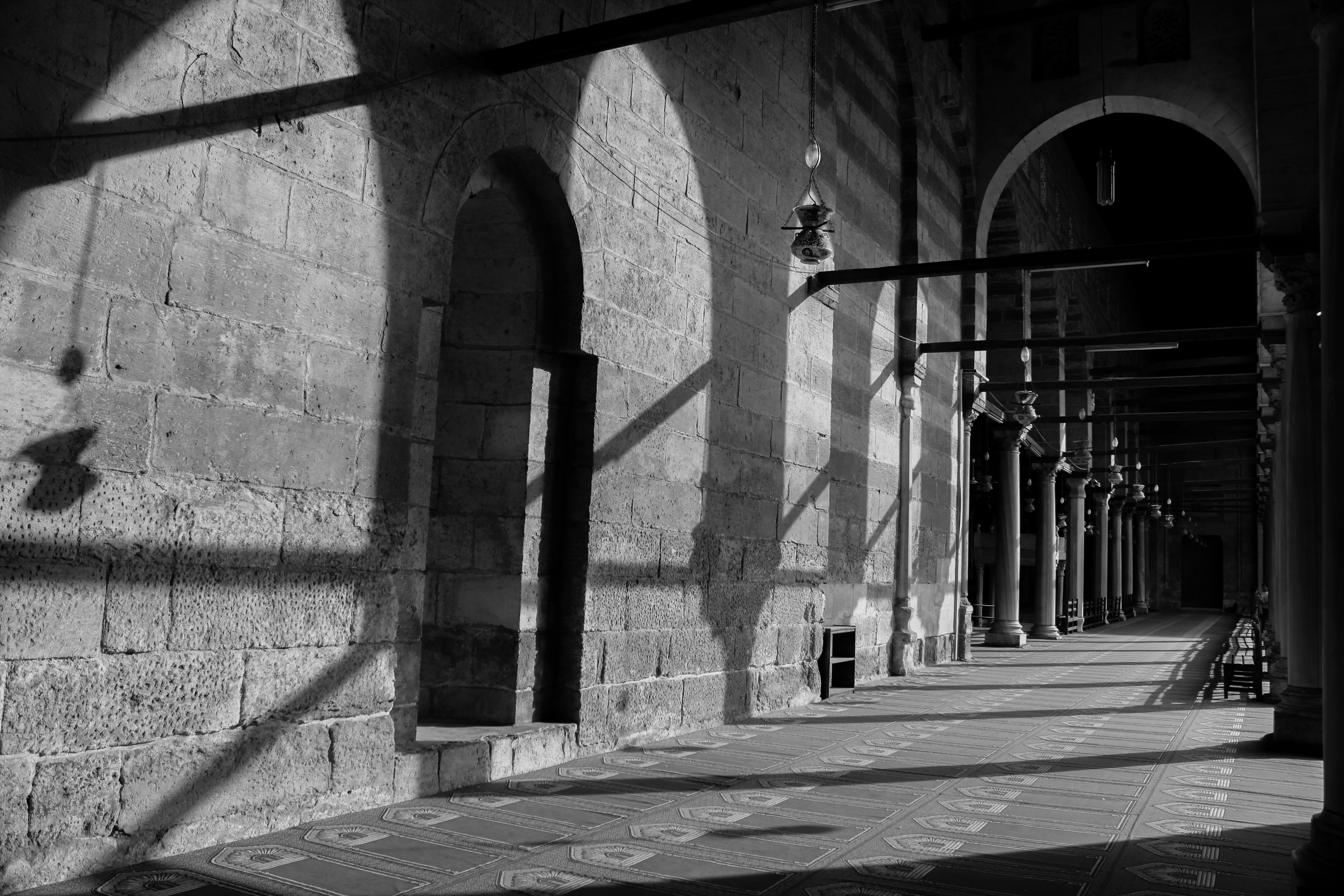 مسجد المؤيد شيخ خلف باب زويلة القاهرةالقديمة